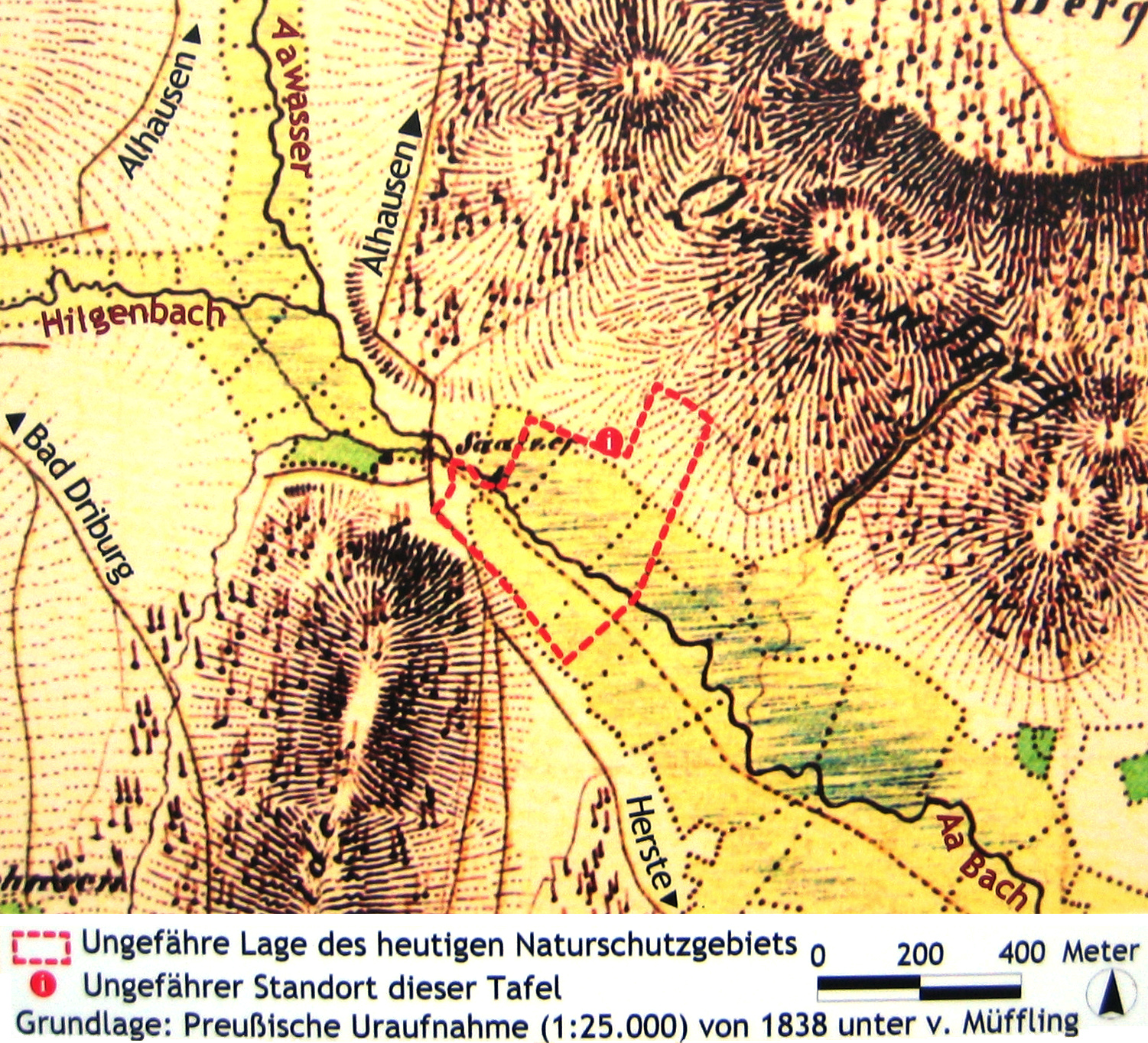 Lage des Satzer Moors, eingezeichnet in die Preußische Uraufnahme von 1838 unter v. Müffling – Ausschnitt aus der Informationstafel der Landschaftsstation im Kreis Höxter am Naturschutzgebiet Satzer Moor, Bad Driburg, Deutschland.